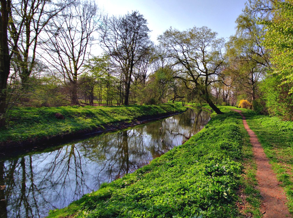 Vigerslevparken in Valby, Copenhagen, Denmark